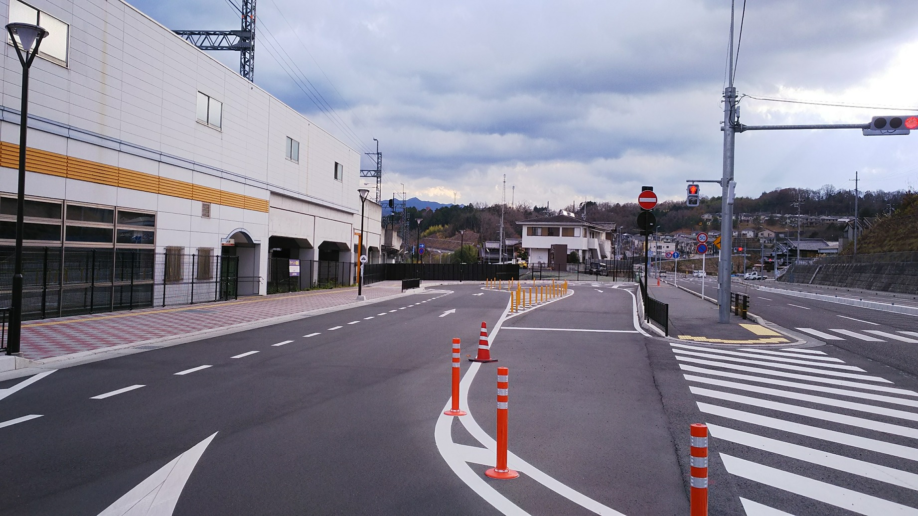 御幸辻駅西口